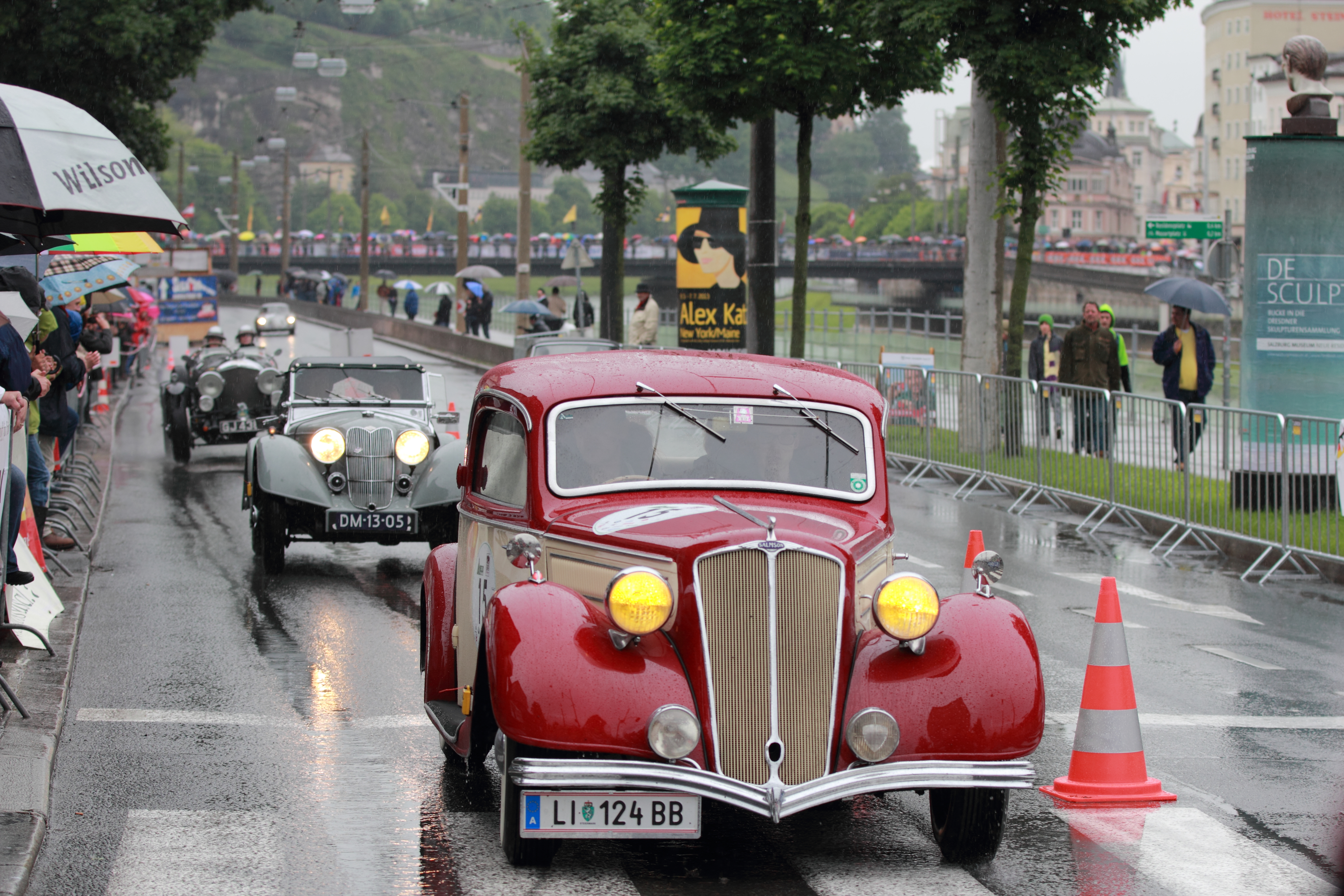 Salmson S 4-61 4-seater, 2-door coupé, engine: 4-cylinders, 1730cc, made between 1938 and 1947 Gaisbergrennen 2013